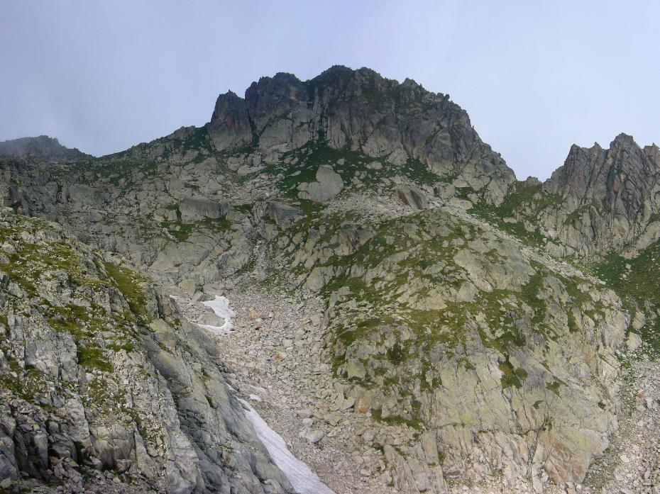 Tuc de Ribereta vist des de l'Estanh Gelat de Ribereta; Naut Aran, Vall d'Aran, Catalunya